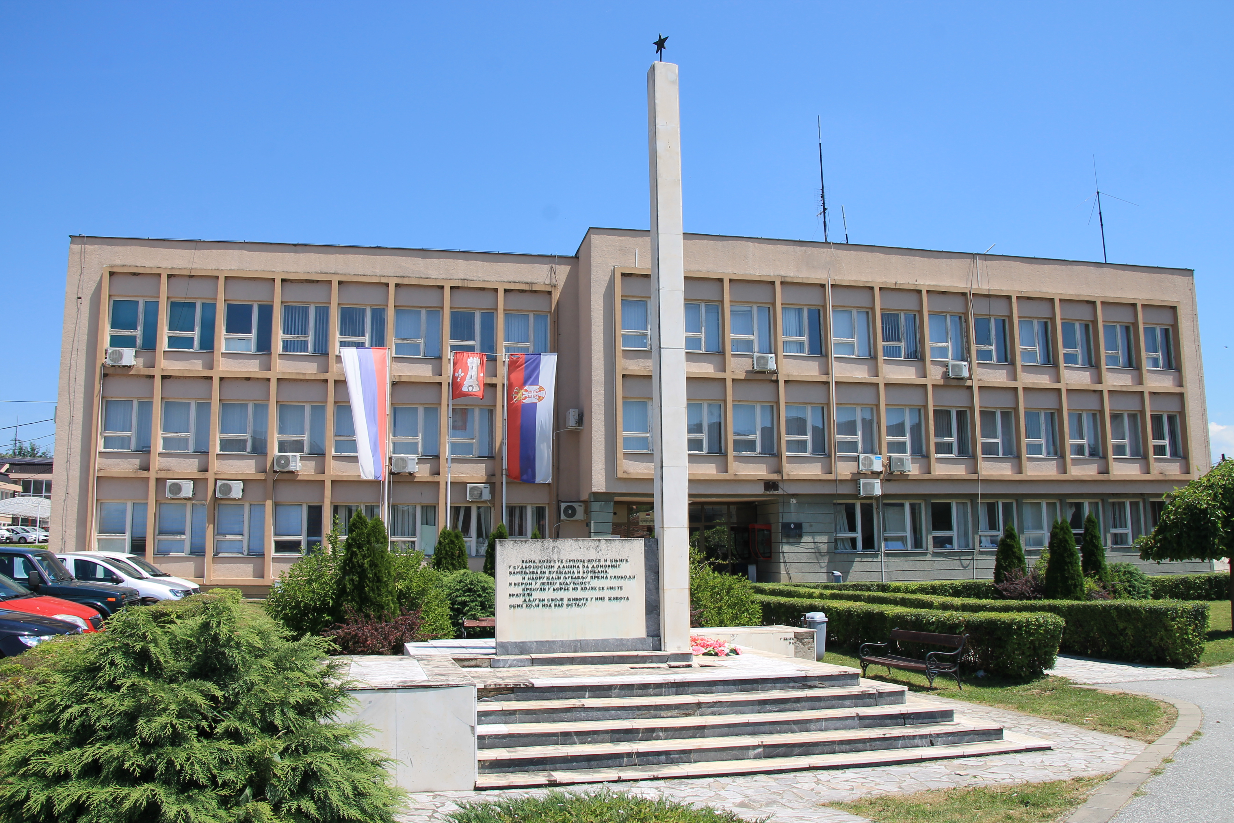 Knić-centar